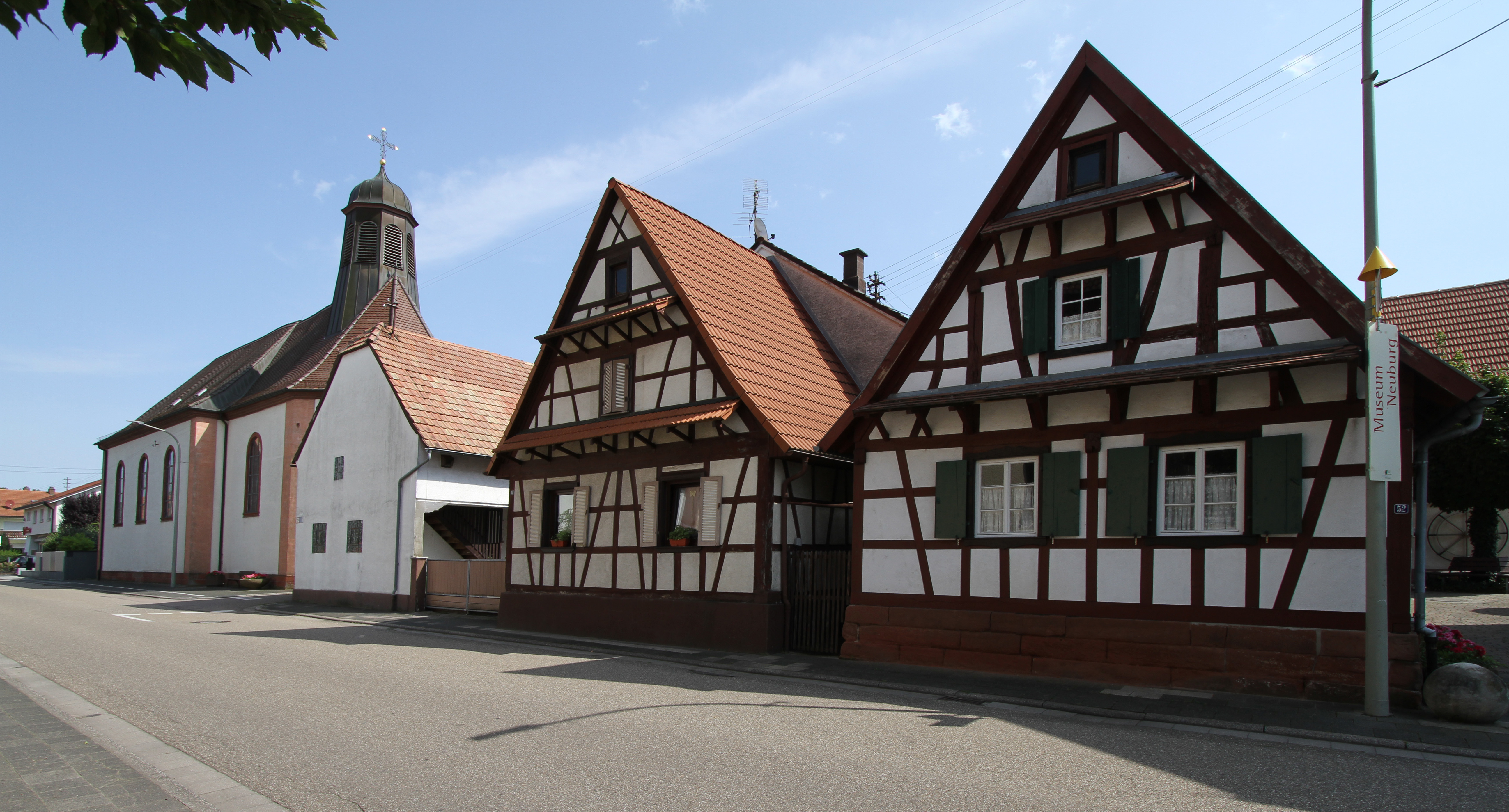 Kulturdenkmal in Neuburg am Rhein